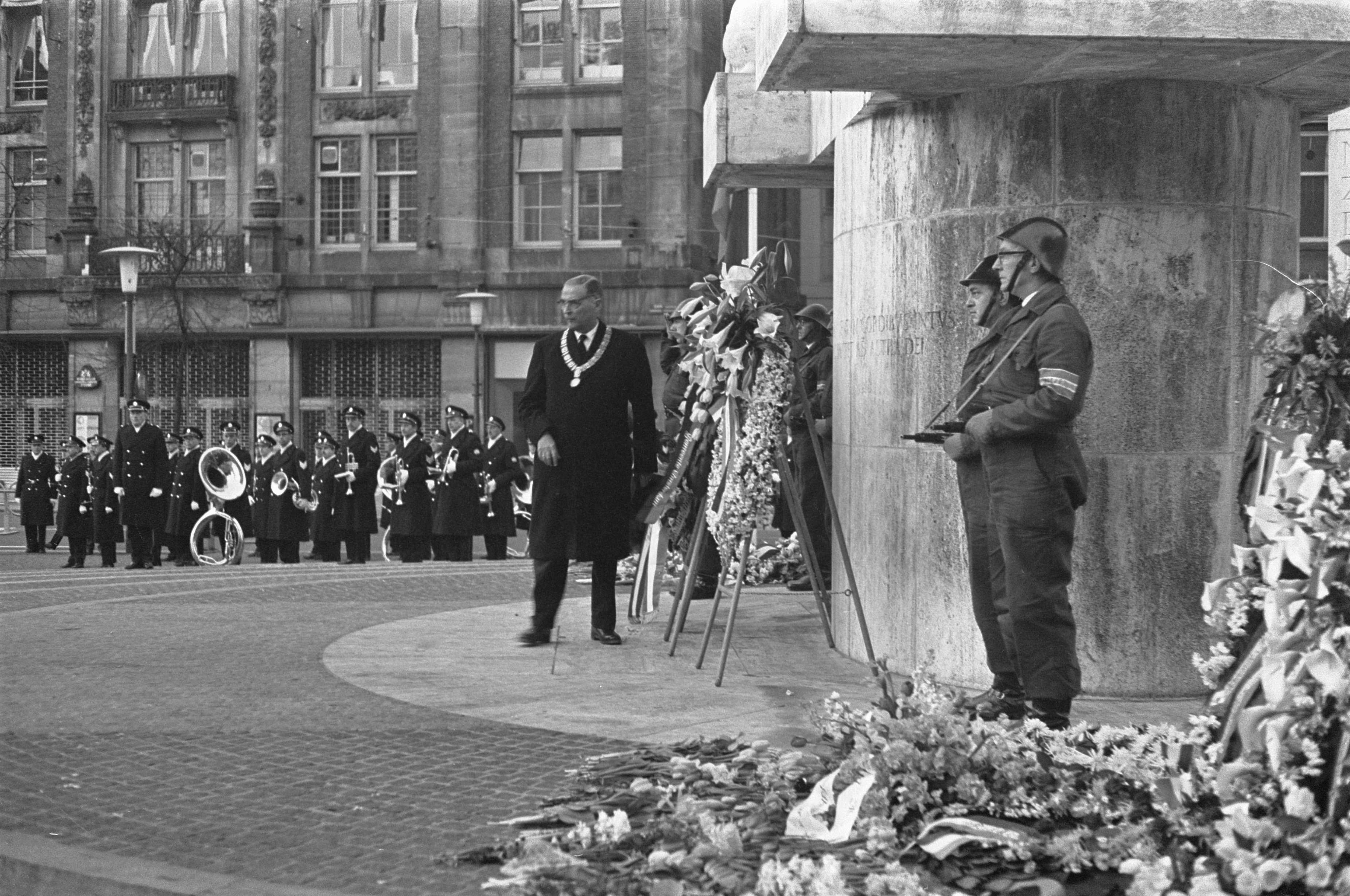 Collectie / Archief : Fotocollectie Anefo Reportage / Serie : [ onbekend ] Beschrijving : Dodenherdenking 1967 op de Dam in Amsterdam; burgemeester Van Hall bij de kranslegging Datum : 4 mei 1967 Locatie : Amsterdam, Noord-Holland Trefwoorden : burgemeesters, dodenherdenkingen, monumenten Persoonsnaam : Hall, G. van Fotograaf : Merk, Ben / Anefo Auteursrechthebbende : Nationaal Archief Materiaalsoort : Negatief (zwart/wit) Nummer archiefinventaris : bekijk toegang 2.24.01.05 Bestanddeelnummer : 920-2973